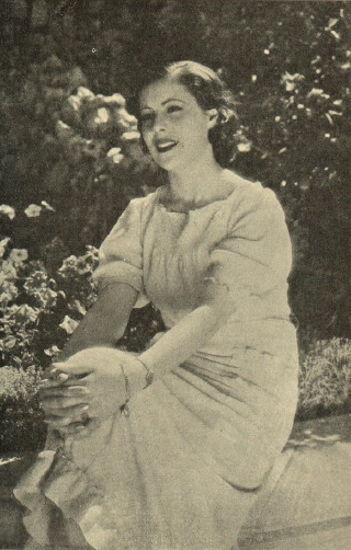 Fotografía de la actriz española Carmen de Lucio publicada en 1935 con motivo de su participación en la película Nobleza baturra y el próximo estreno de La hija del penal.